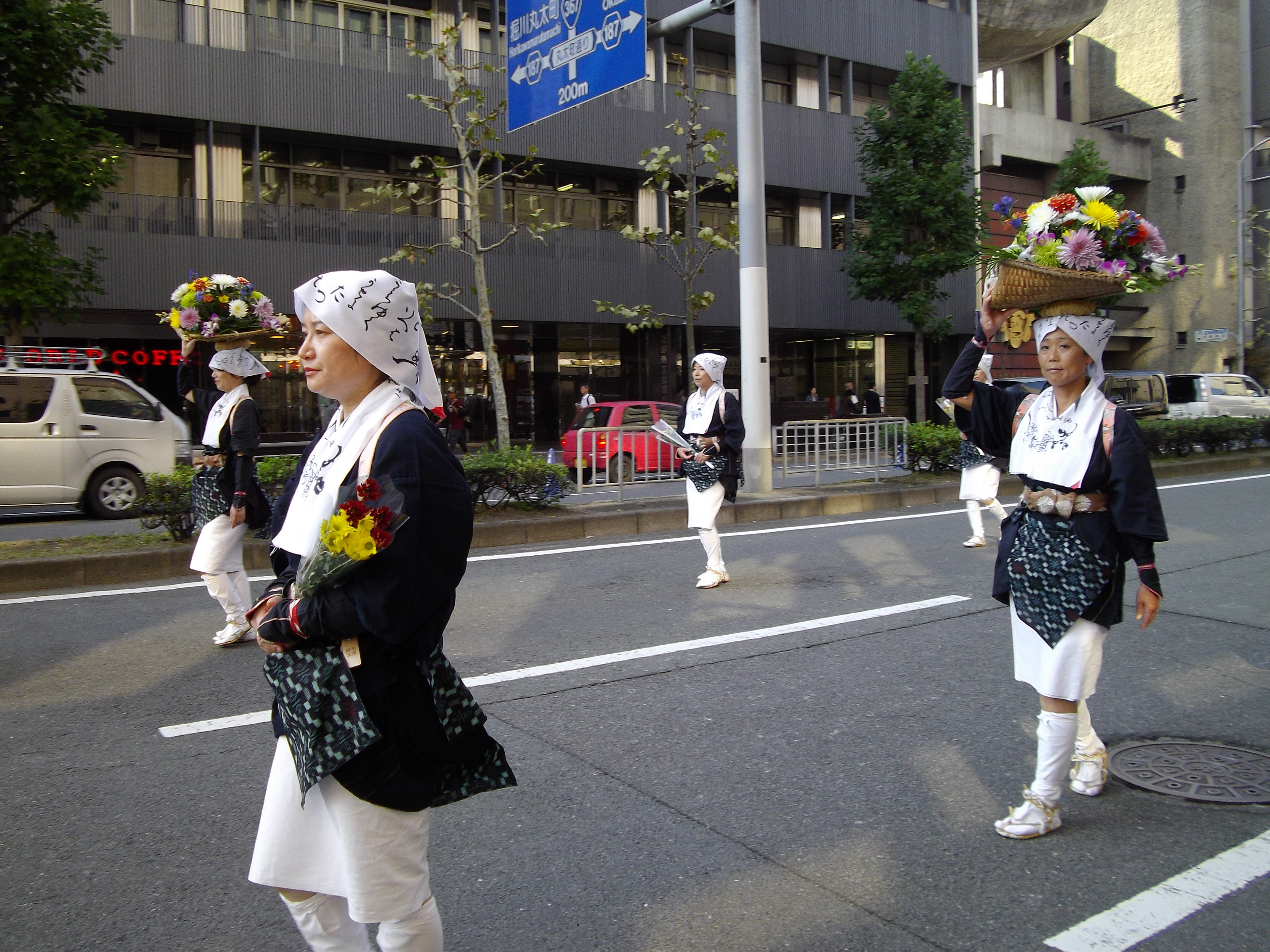 京都・北白川の白川女。2012年時代祭の行列による。